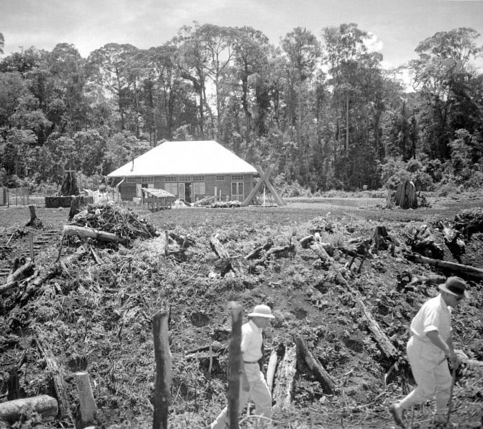 Negatief. Kolonistenwoning, Dairi kolonisatie, Sumatra's Westkust